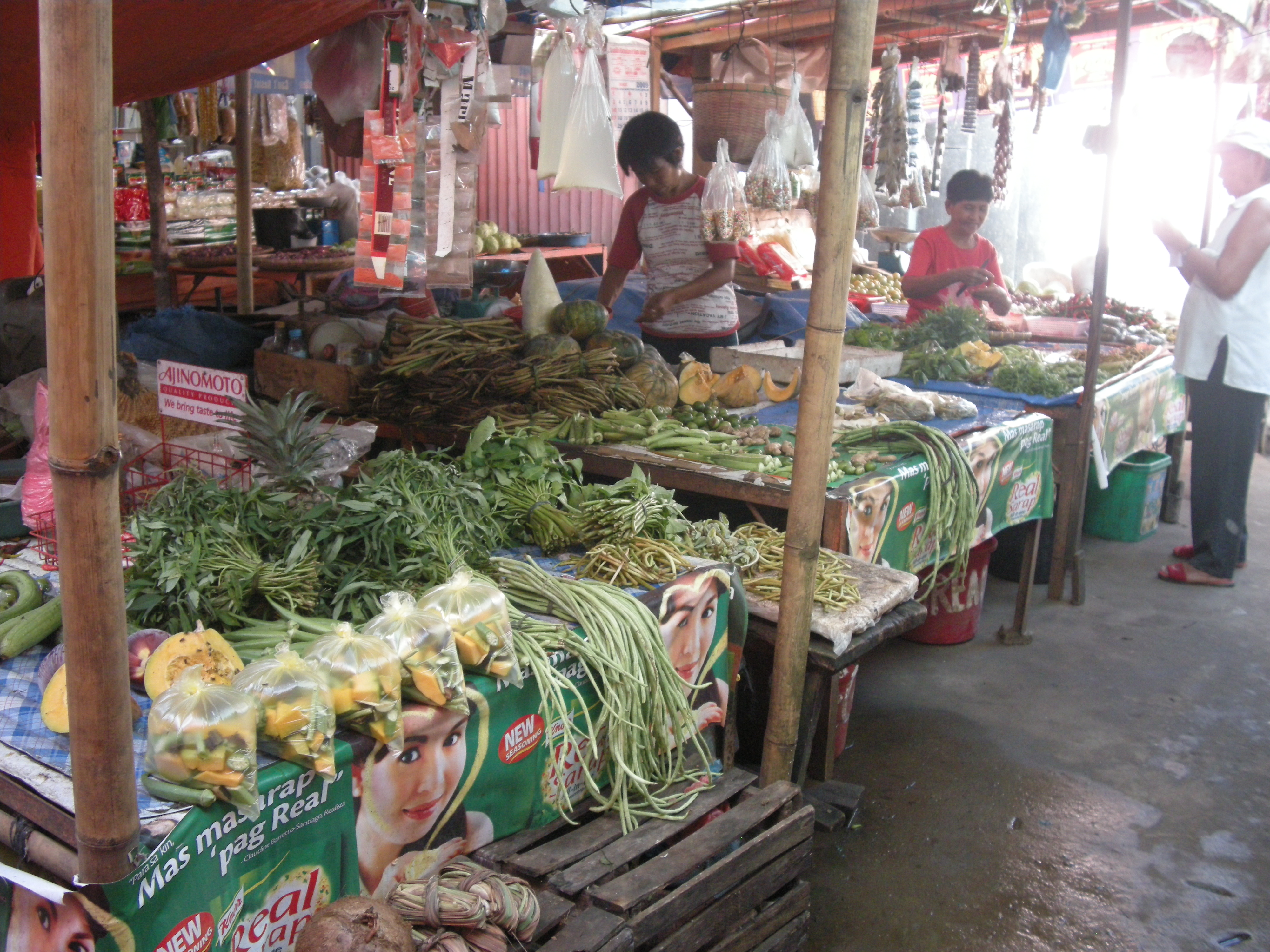 Ivisan market